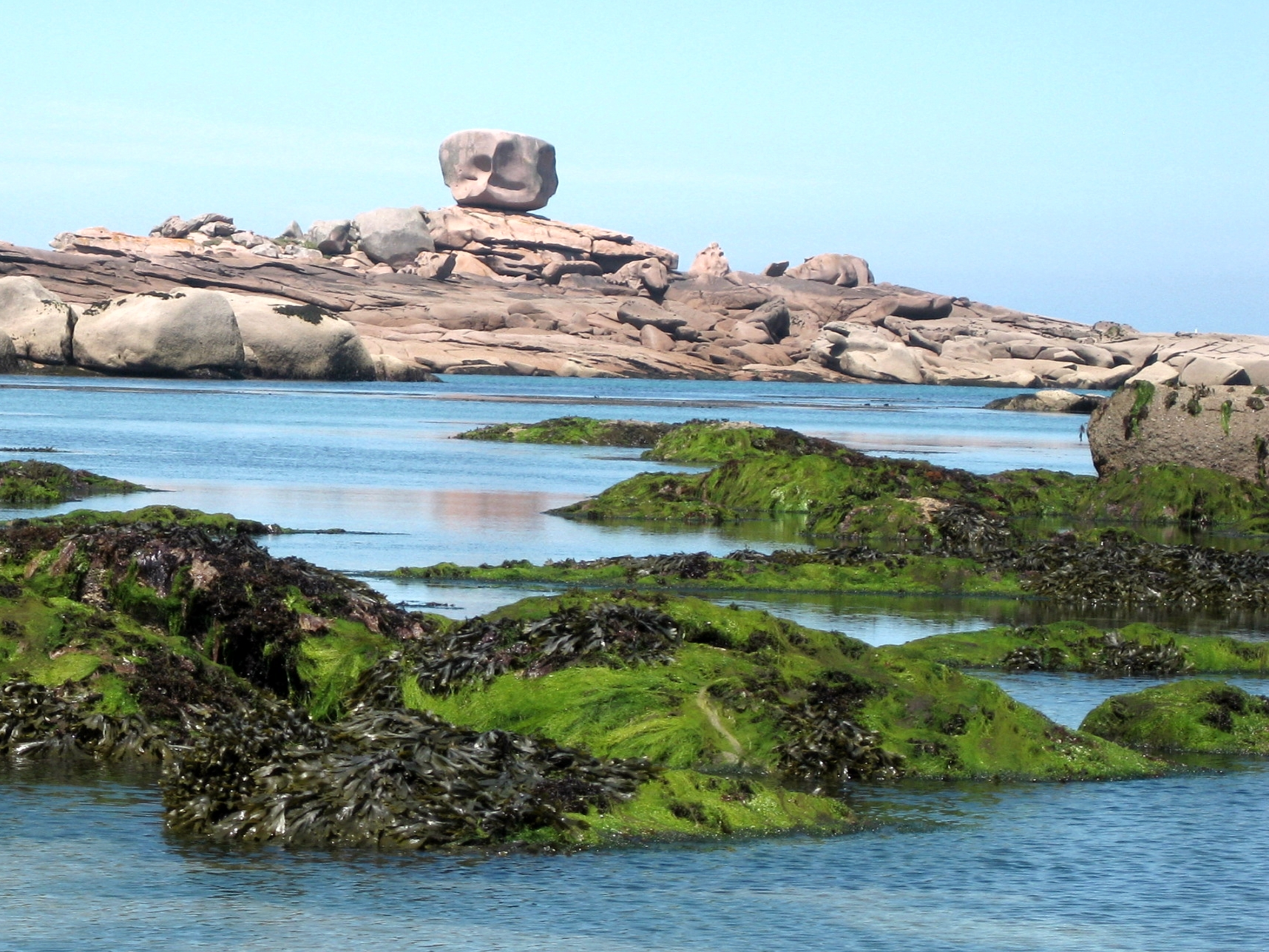 "Le dé" (Würfel)